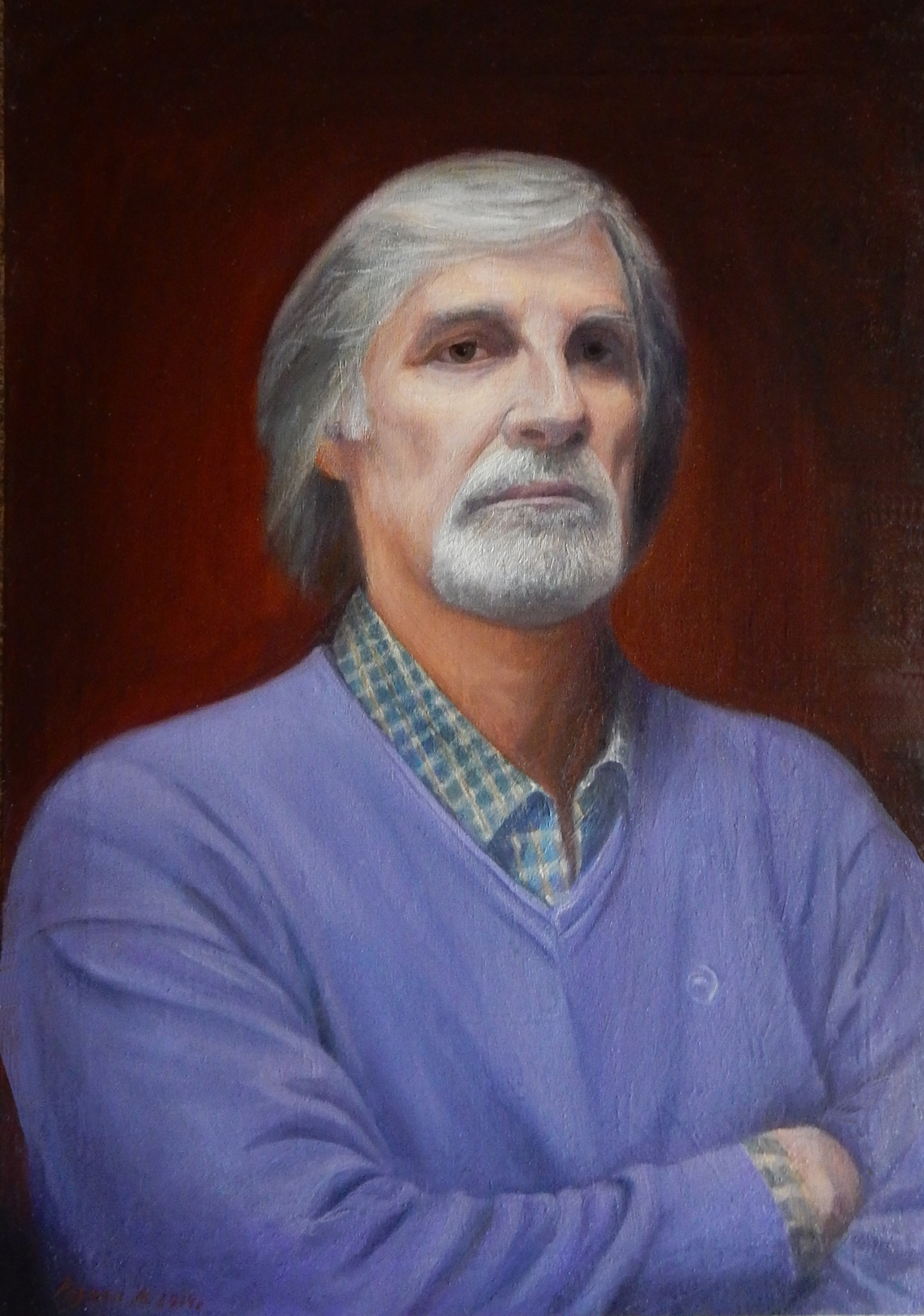 Василий Хасапов